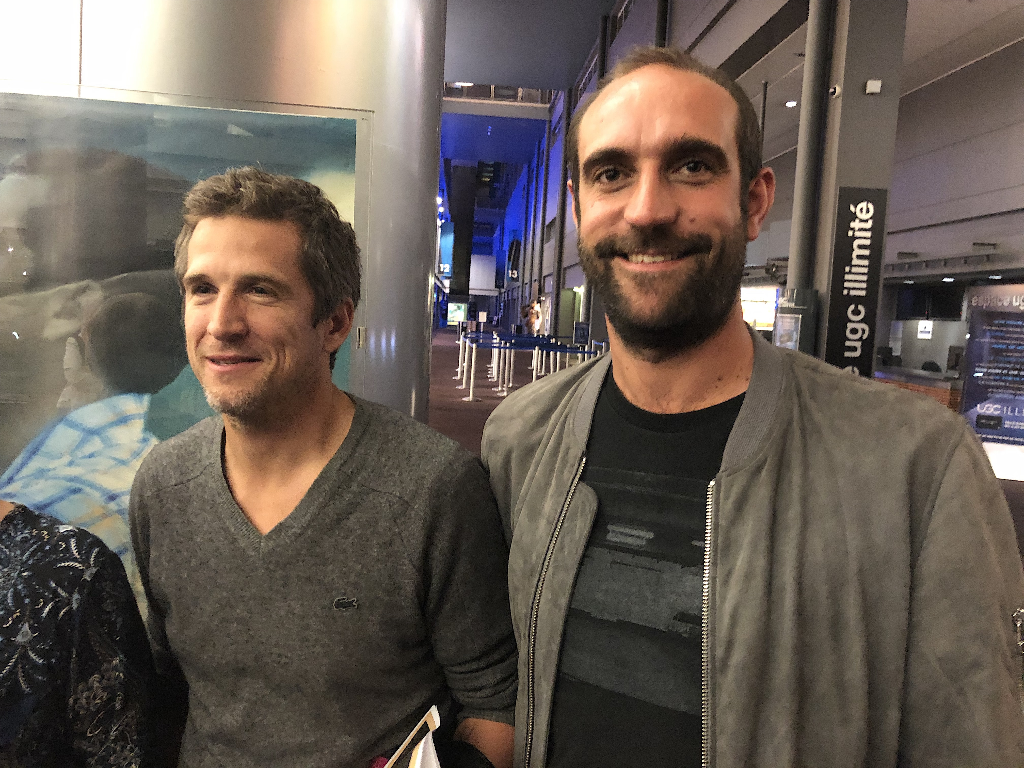 Guillaume Canet et Edouard Bergeon.